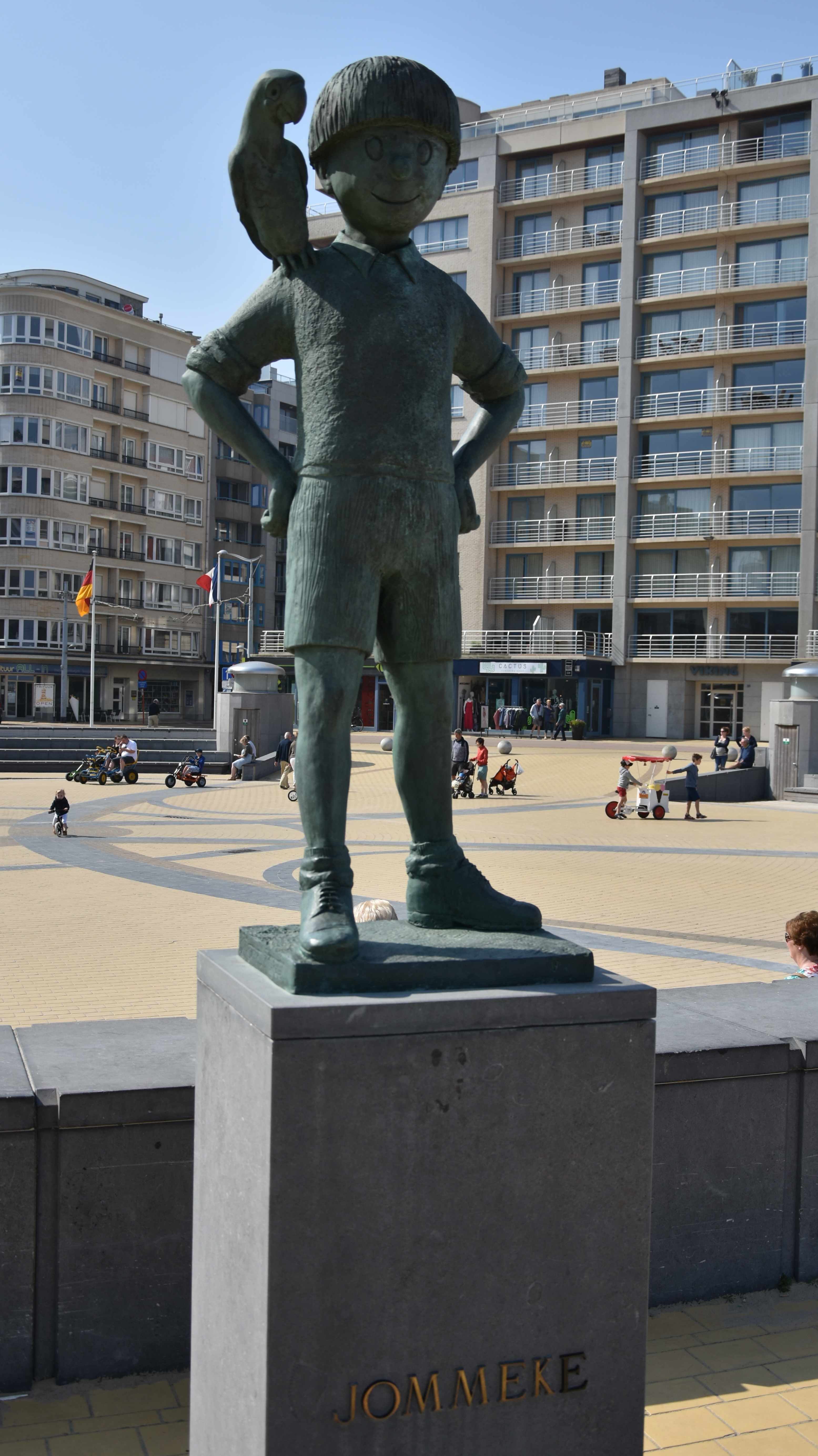 Jan Maillard - Nero - Stripstandbeelden Middelkerke